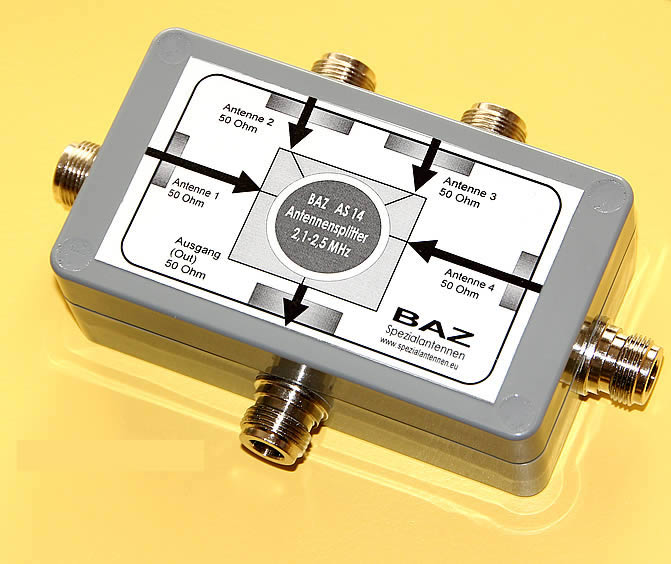 Antennensplitter 4-way